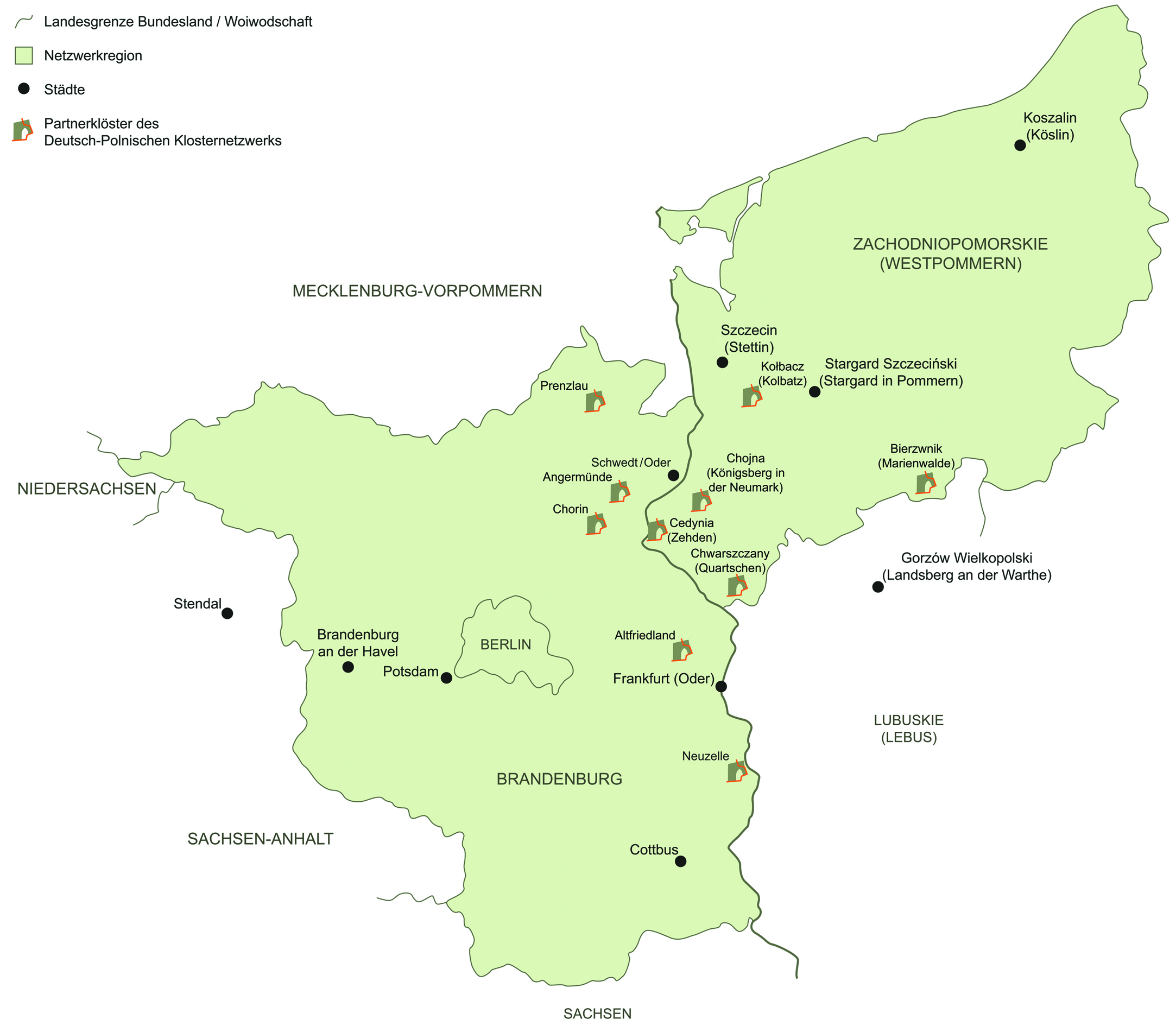 Klosterland - Übersichtskarte der Partner des Deutsch-Polnischen Klosternetzwerks